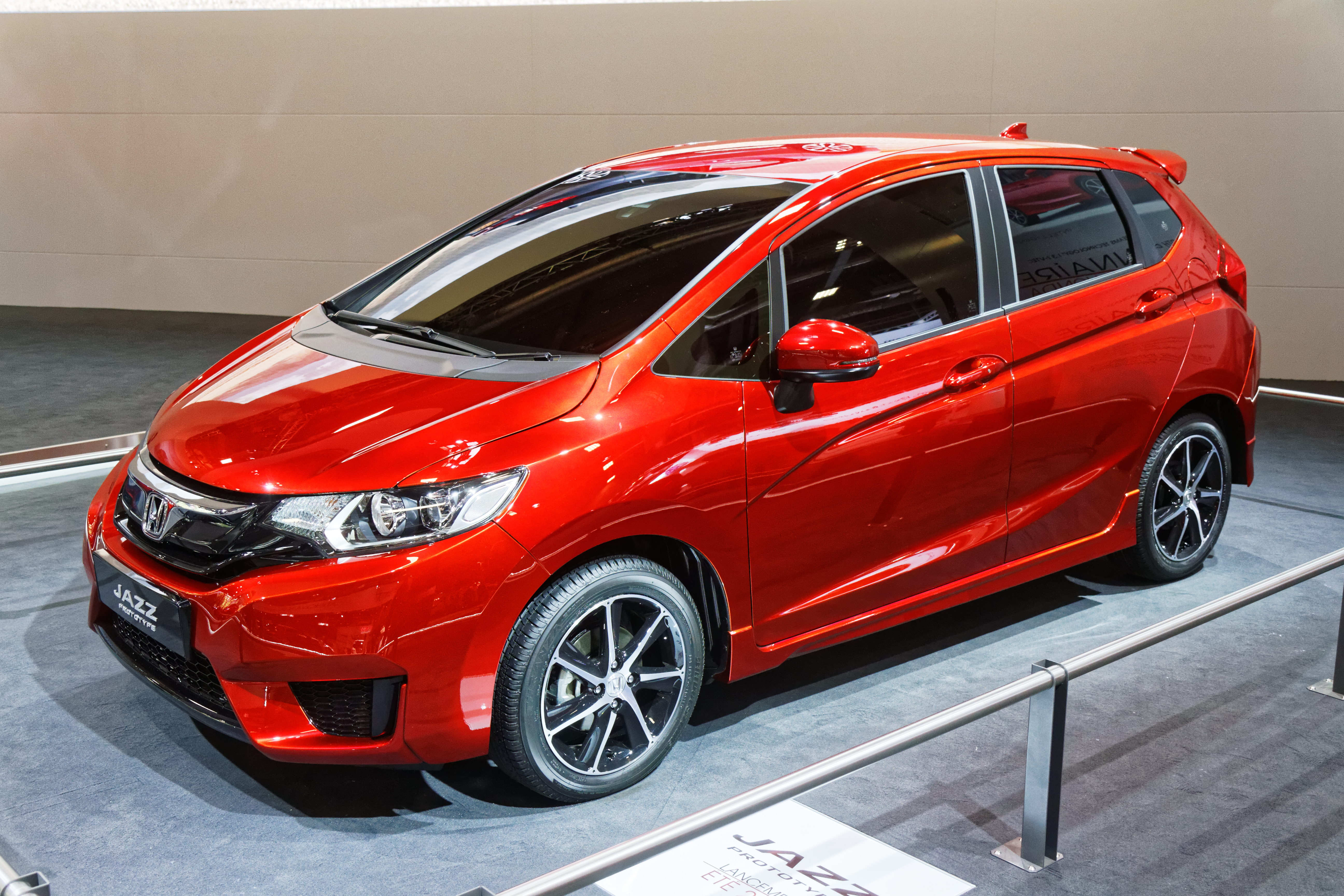 Une Honda Jazz Prototype présentée lors du mondial de l'automobile de Paris 2014.